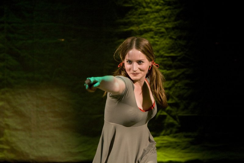 Marit Slinger (Naarden, 3 november 1982) is een Nederlands zangeres en actrice. -- Marit Slinger als Roodkapje in Into the Woods (2007)